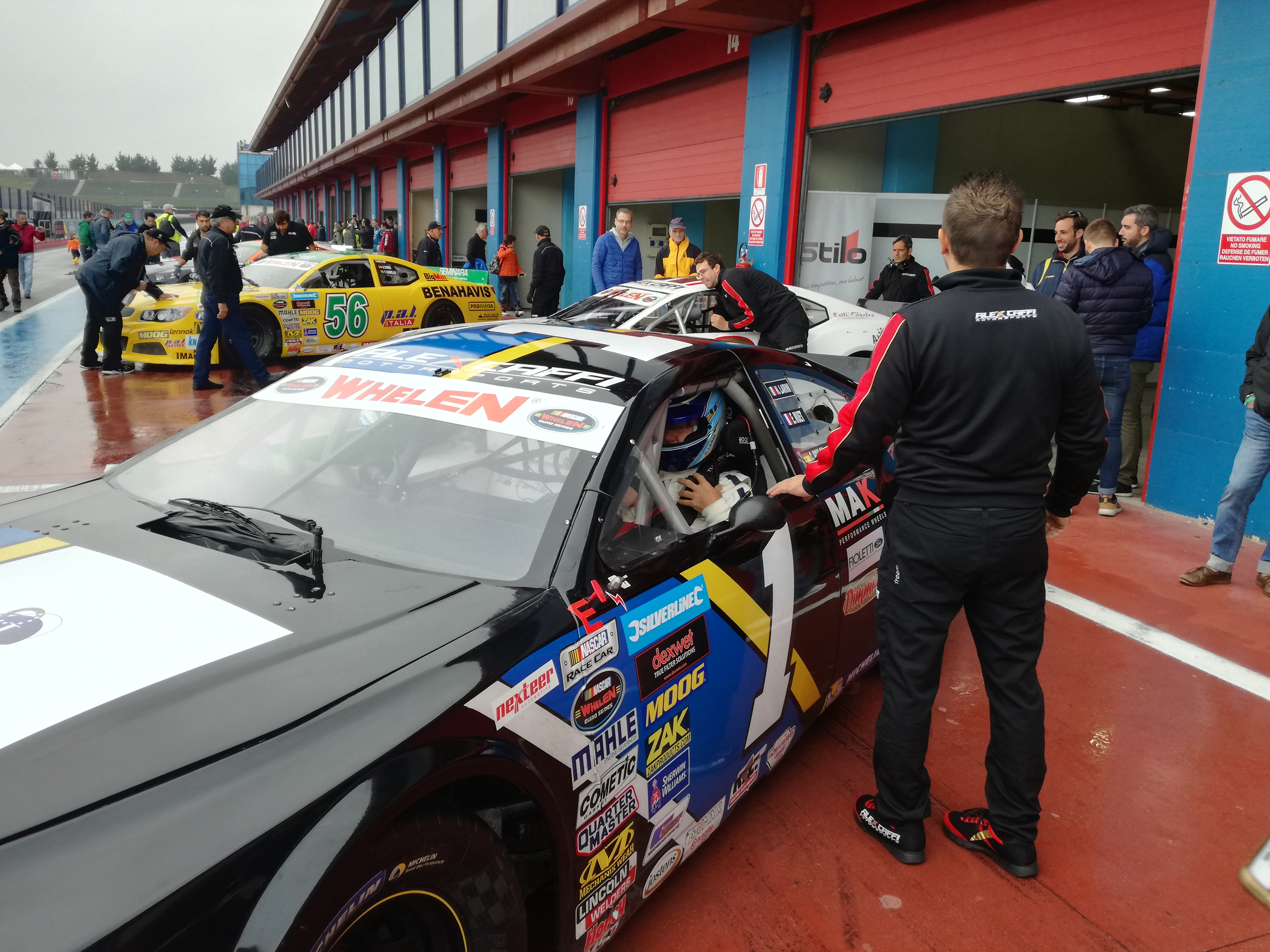 Nicola Larini sulla Ford Mustang del team Alex Caffi Motorsport alla semifinale Nascar Euro Series tenutasi all'Autodromo di Franciacorta il 16 e 17 settembre 2017.